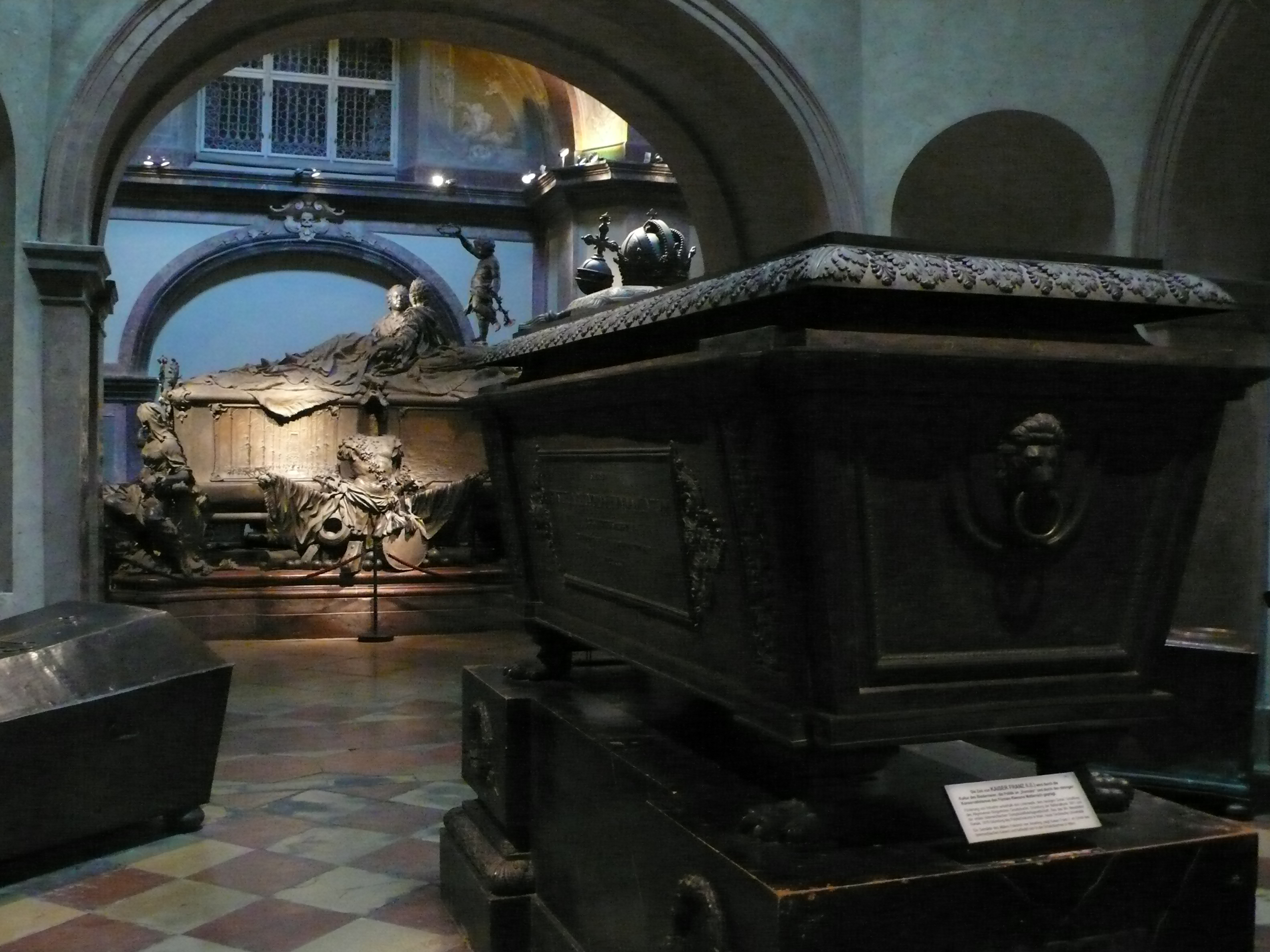 Kapuzinergruft, Wien, Sarkophag Franz I., Kaiser von Österreich (1768–1835), im Hintergrund Sarkophag Kaiserin Maria Theresia